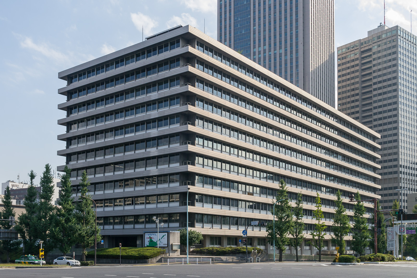 中央合同庁舎4号館、内閣府など。東京都千代田区霞が関。